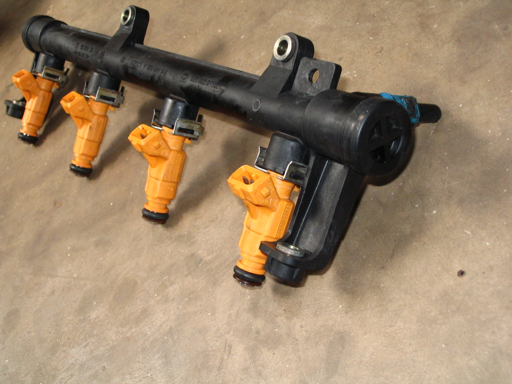 tubo distribuição de combustível e injetores do Astra Chevrolet Brasil